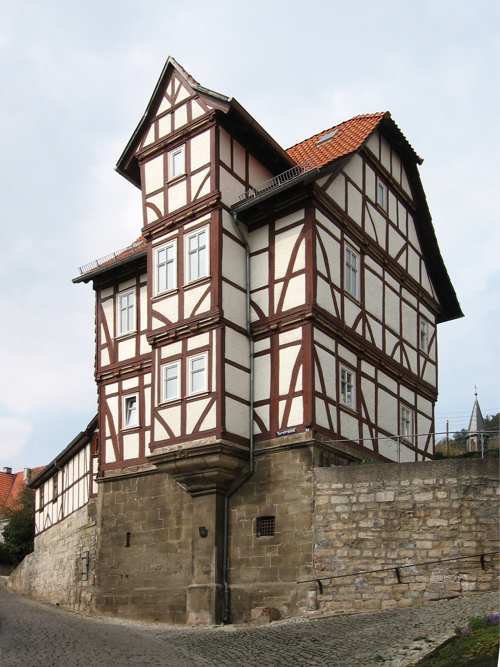 Treffurt/Germany: Haus Falkenstein